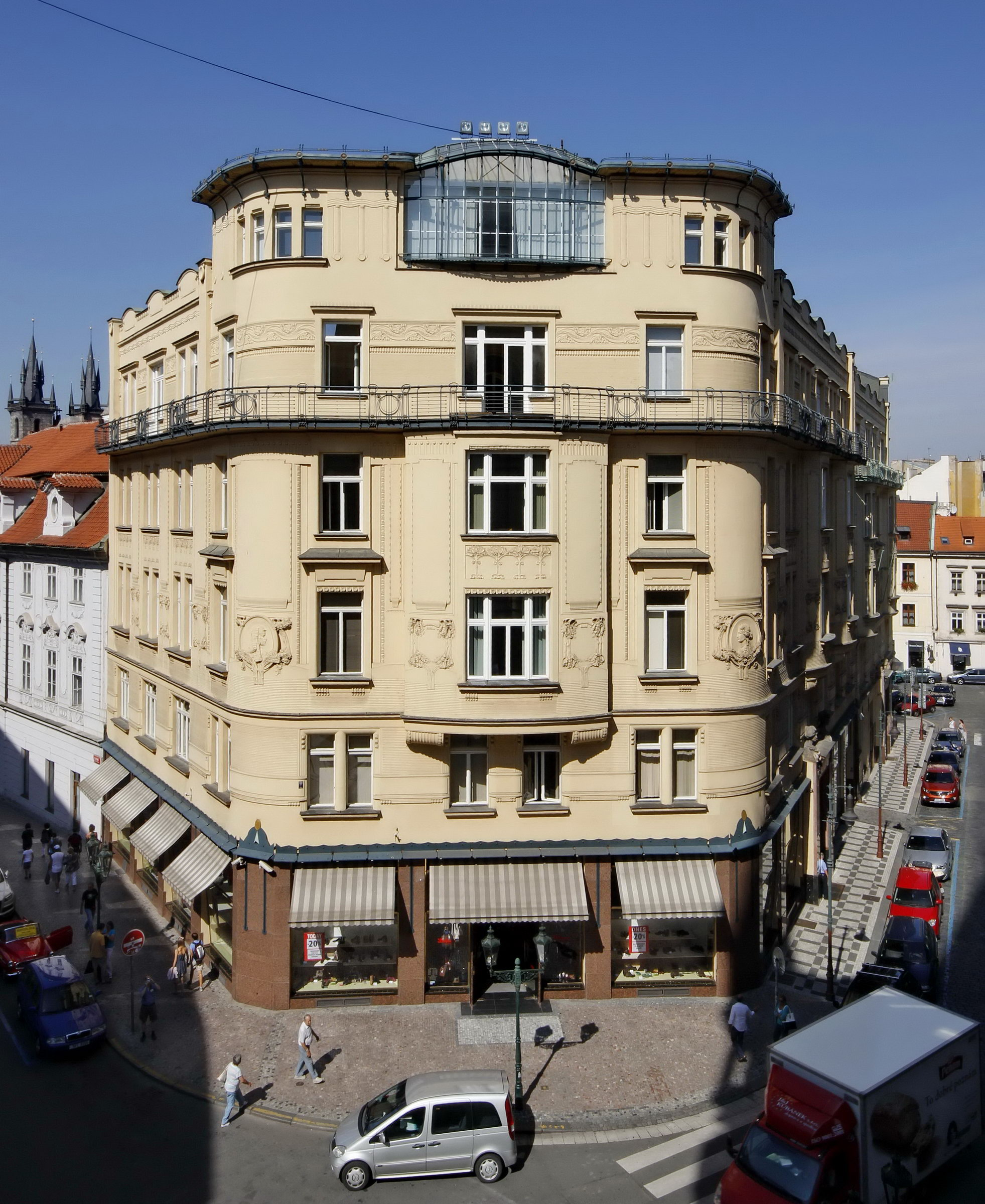 Bedřich Bendelmayer a Emil Weichert, Nájemní dům čp. 1078, Praha 1-Staré Město, U Prašné brány 1. 1903-1904